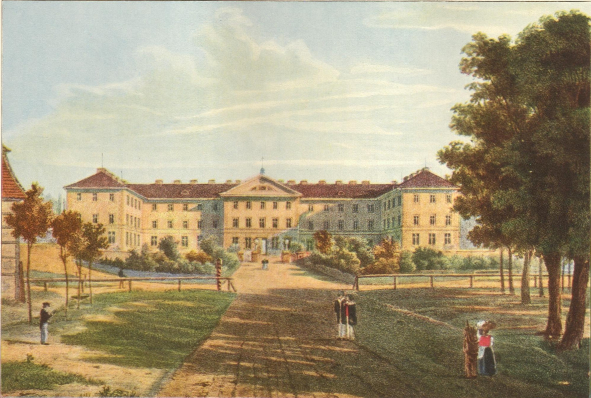 Katharinenhospital in Stuttgart von Südeen, 1828.